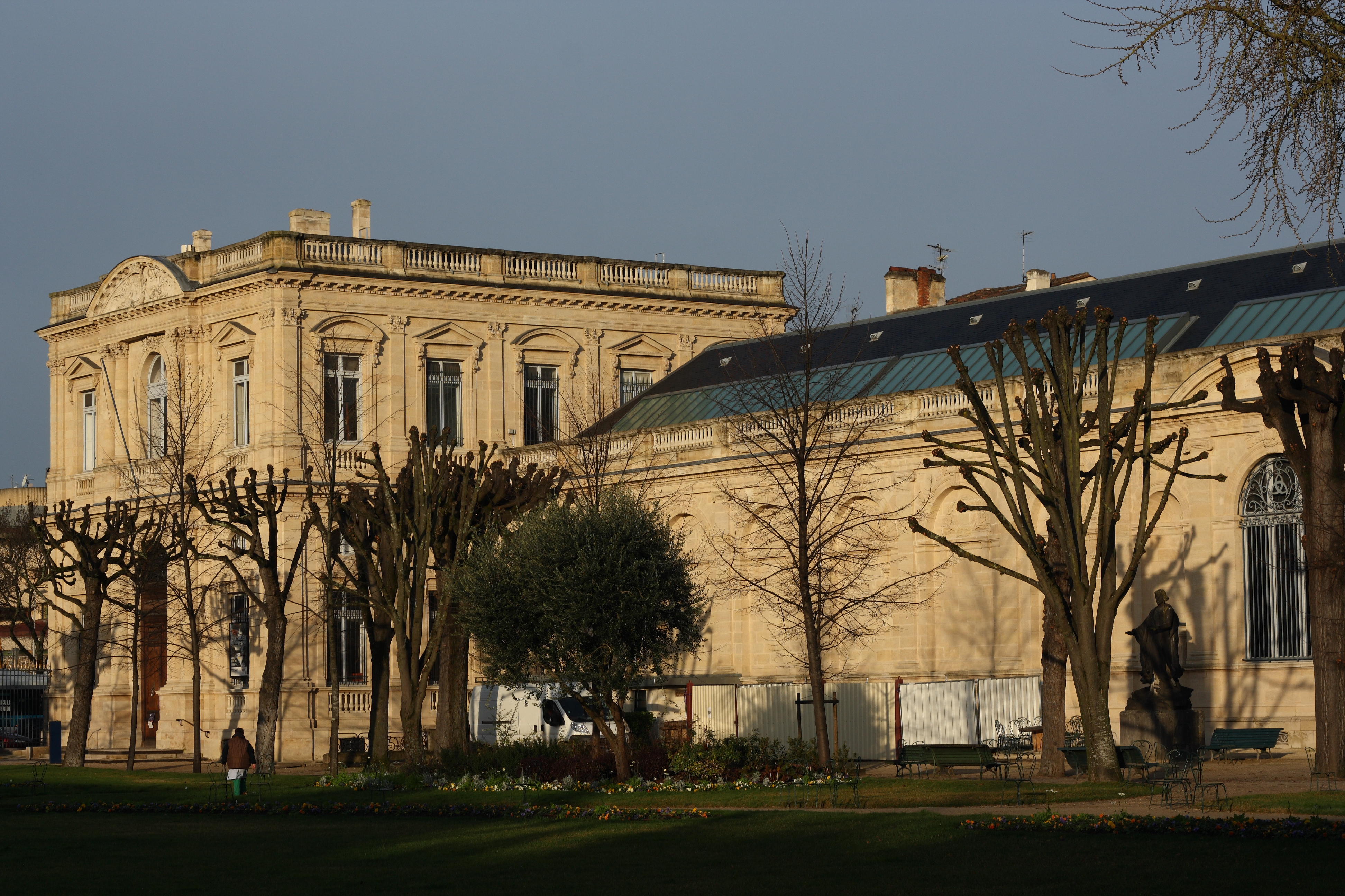 Musée des Beaux Arts (Kunstmuseum) in Bordeaux (Region Aquitanien, Frankreich), rückwärtiger Anbau von 1880 an das Hôtel de Ville (Rathaus)/Palais de Rohan